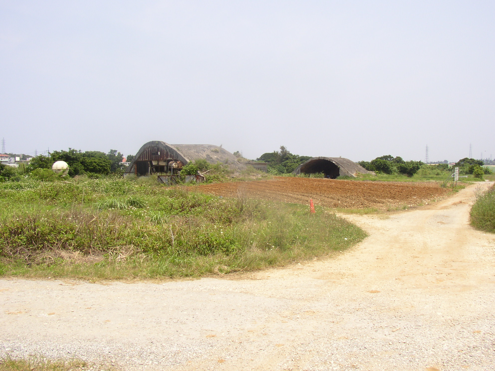 読谷村の掩体壕（2007）